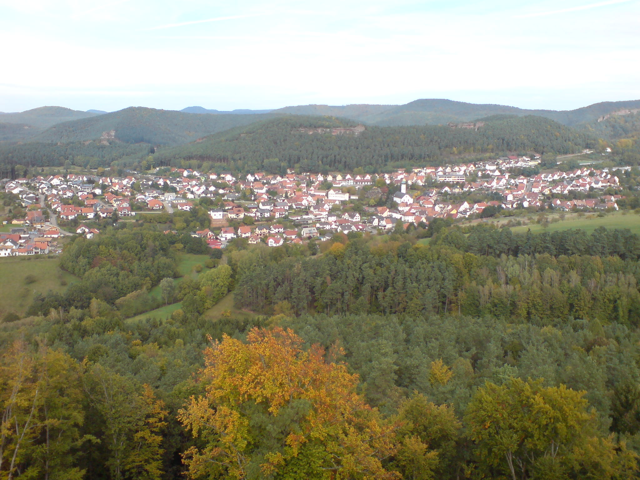 Busenberg vom Drachenfels aus gesehen.